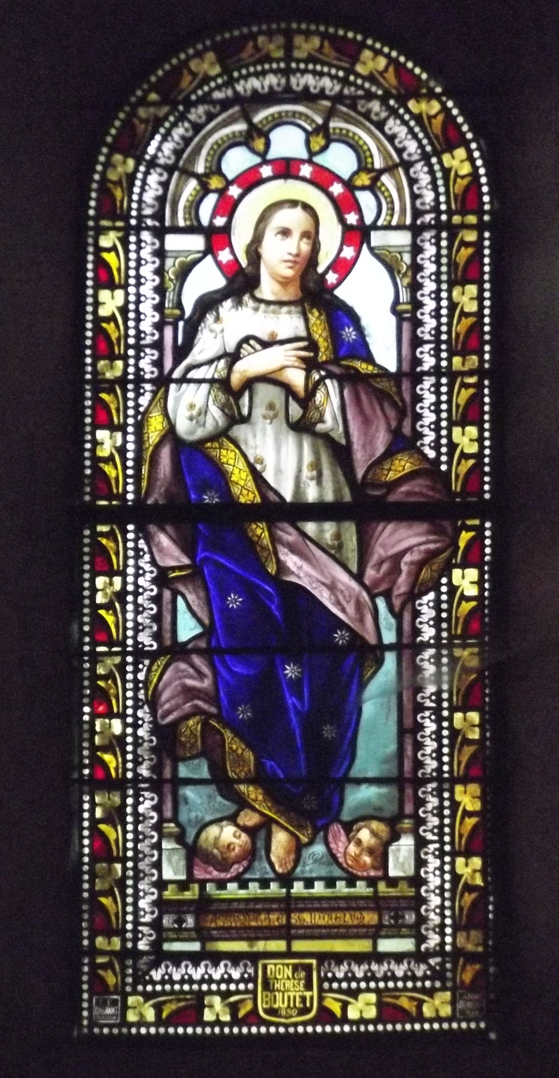 Église du XIVe restaurée au XVIIIe